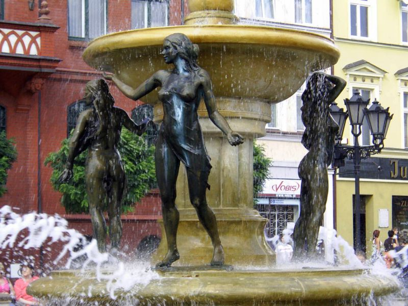 Fontanna (Chojnice; Polska)